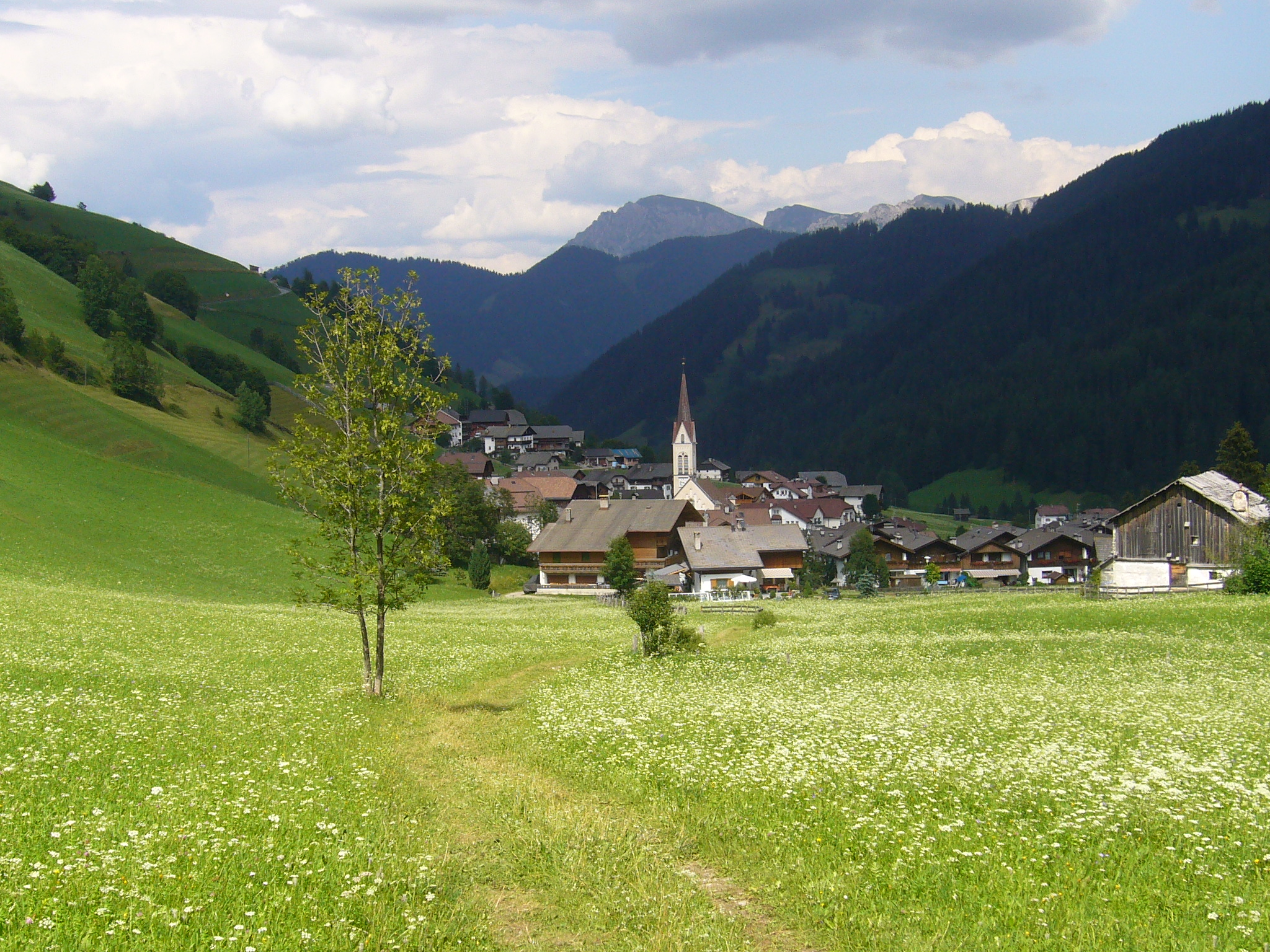 Autore:autodelta85 Scorcio sulla frazione Lungiarü di San Martin de Tor (San Martino in Badia, BZ, Italia)